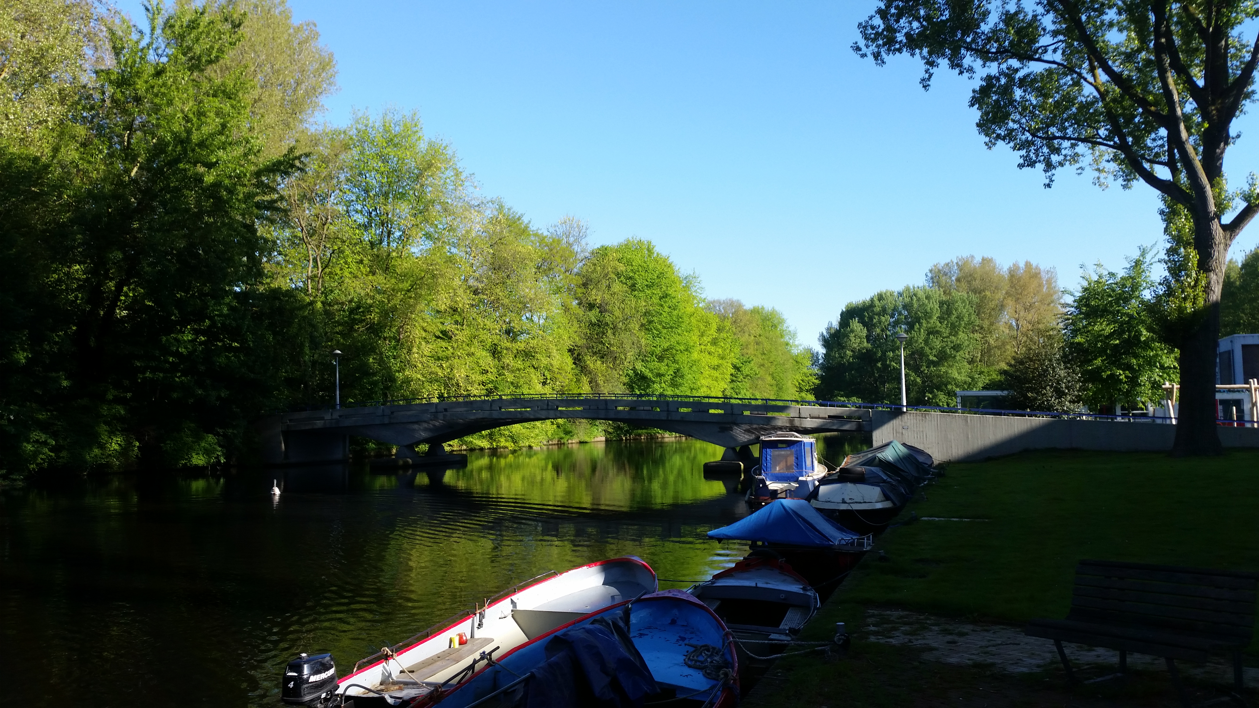 Brug 684, Duizendste brug, nabij Antillenstraat, Postjeskade, Amsterdam